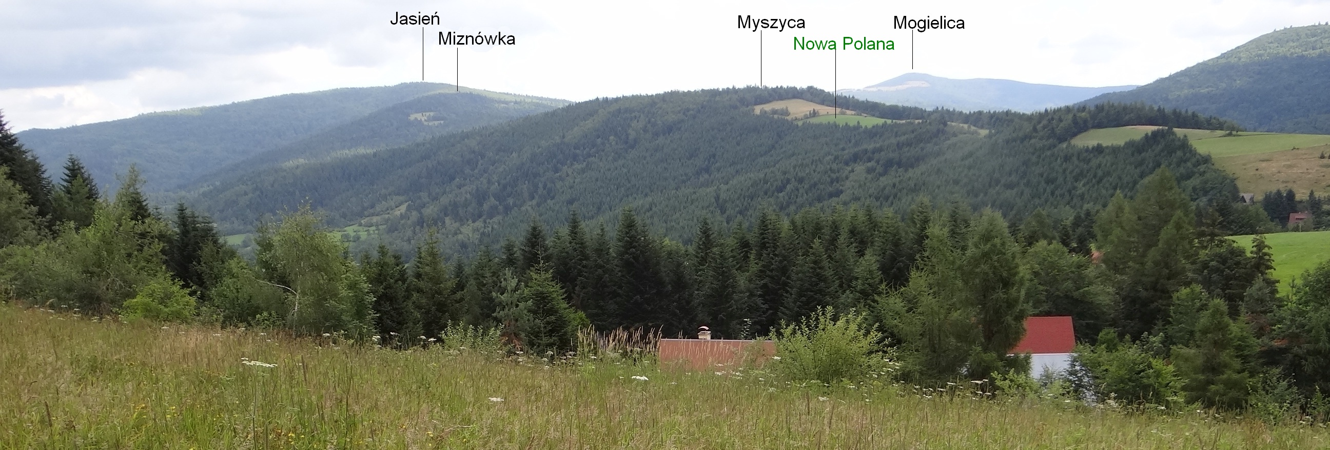 Widok z polany Jaworzynka w Gorcach